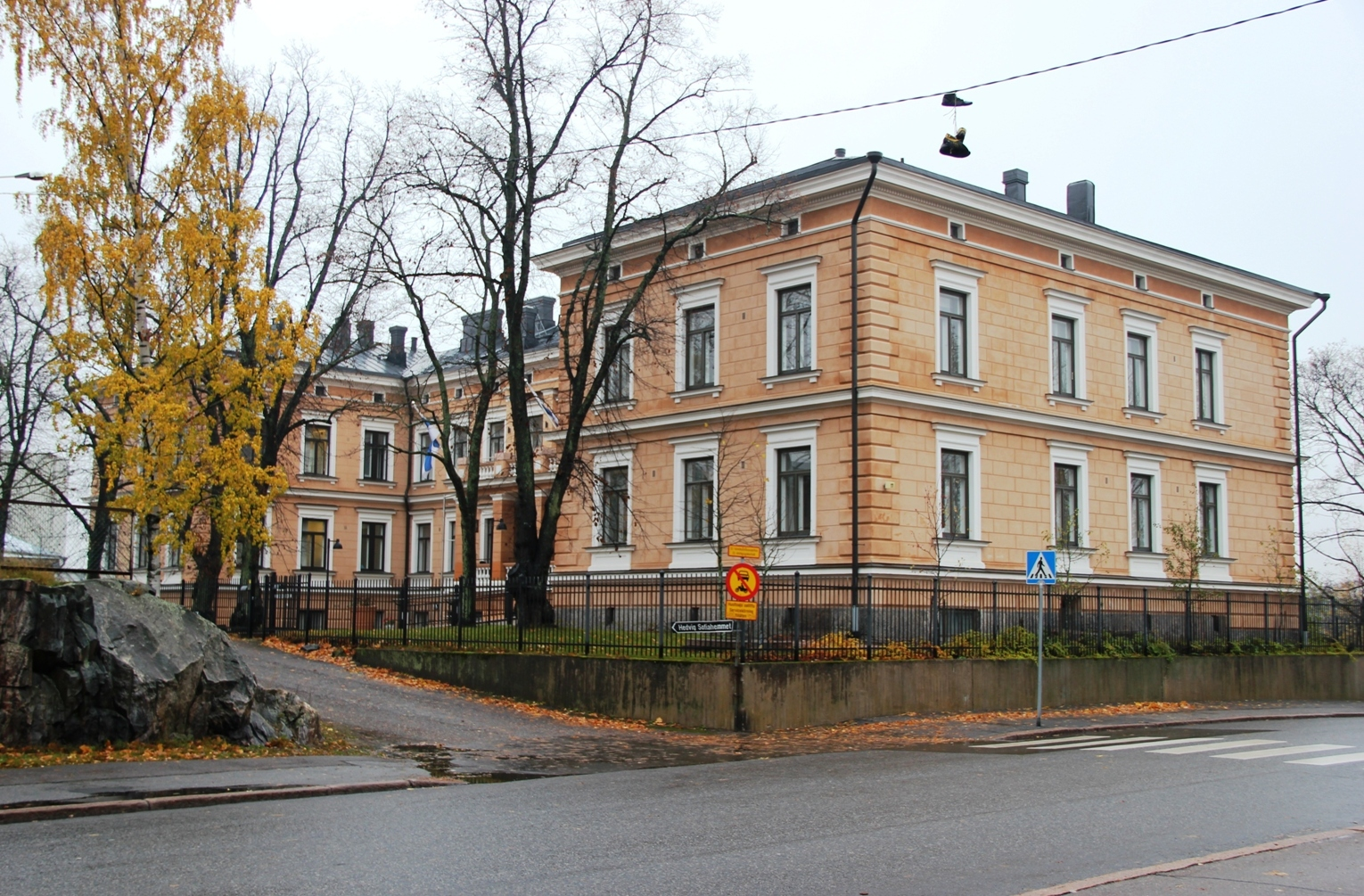 Hedvig Sofiahemmet, Eläintarhantie 11, Kallio, Helsinki (Huomaa sähkölangalla roikkuvat kengät)